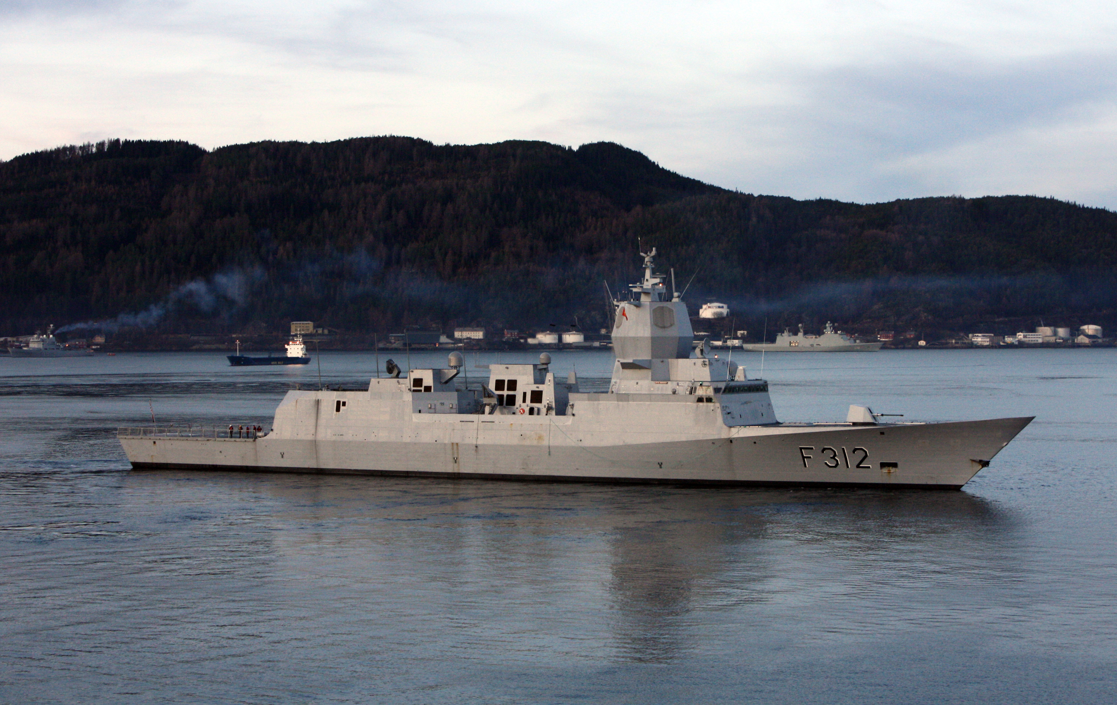 KNM Otto Sverdrup forlater Trondheim havn.